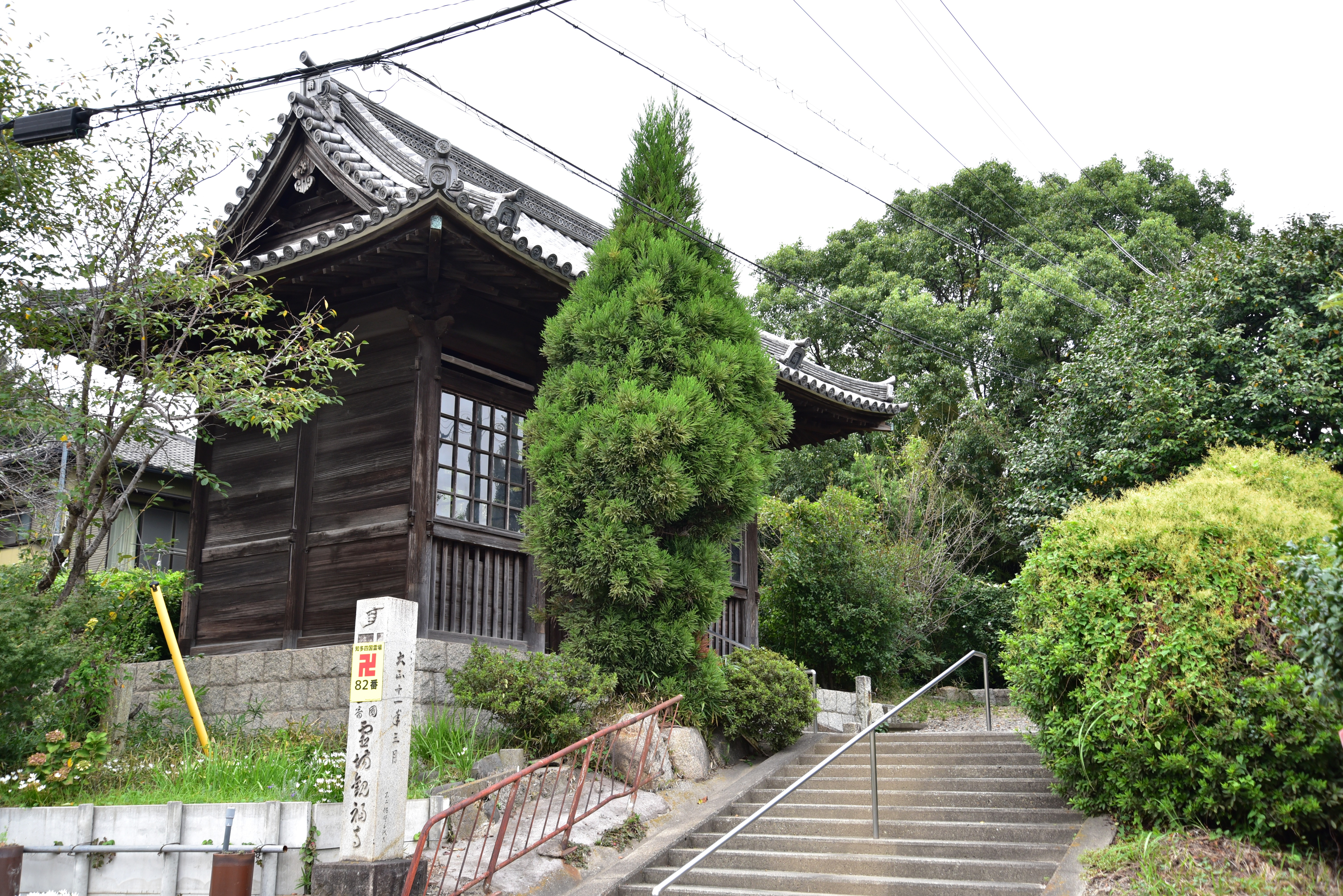 観福寺仁王門